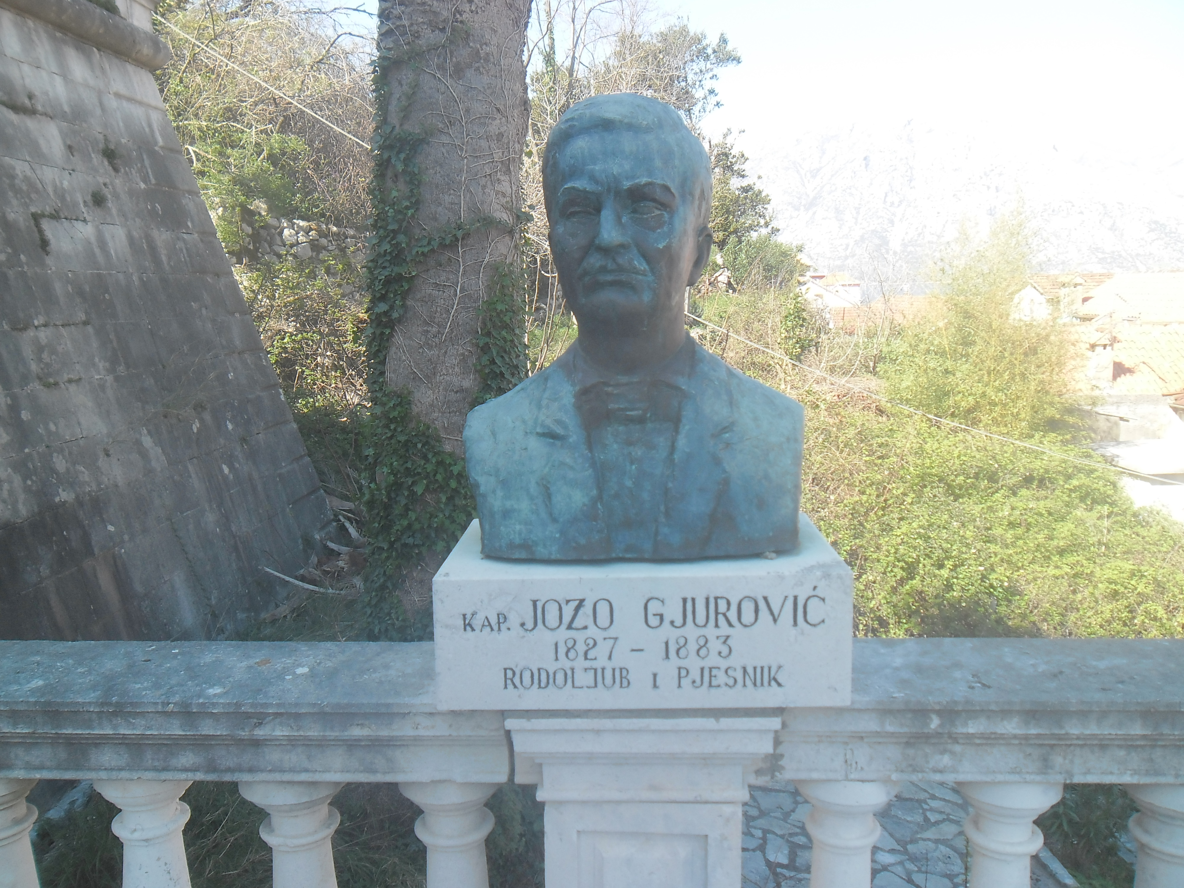 Prčanj